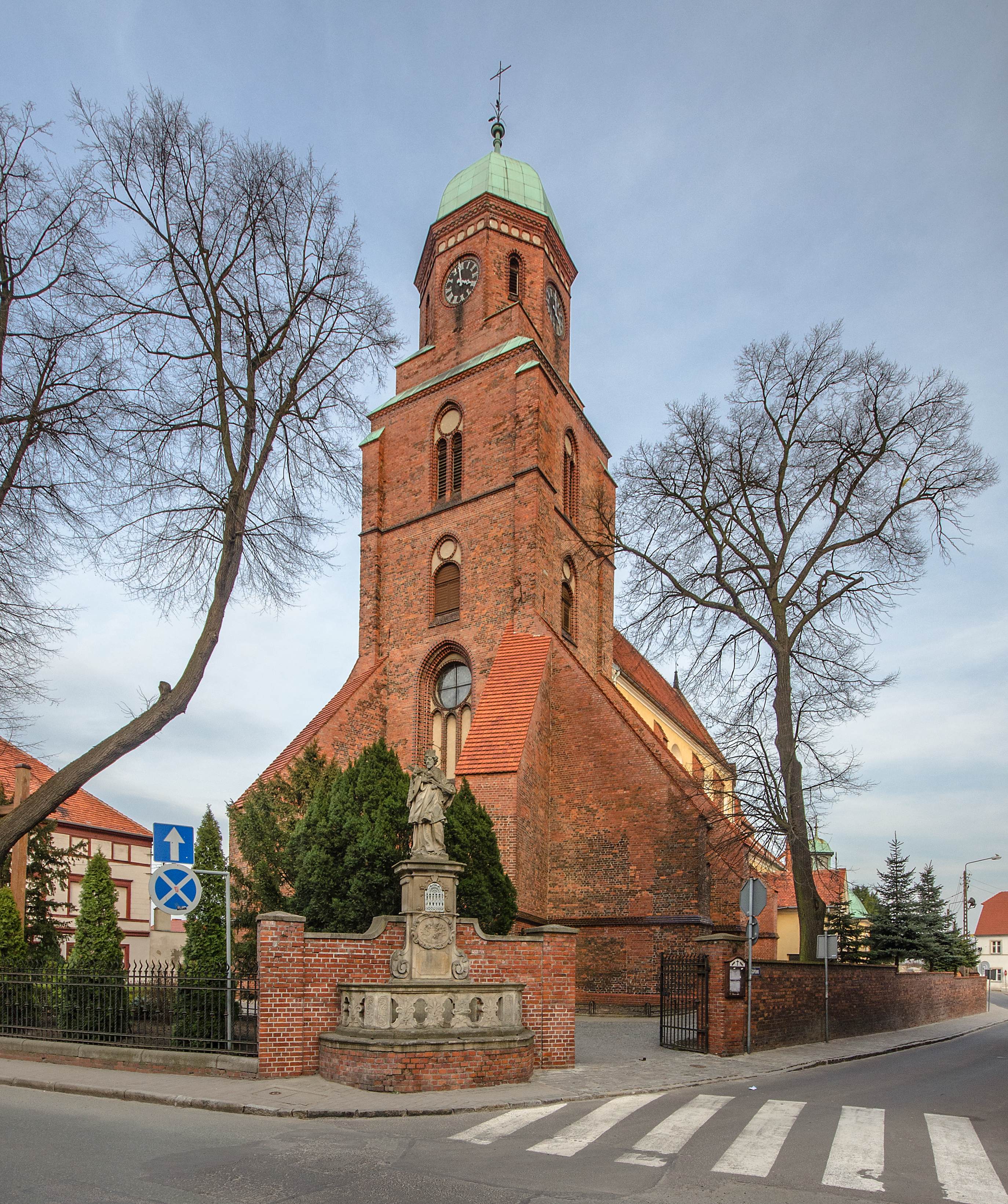 Żmigród, kościół par. p.w. Św. Trójcy, 1599, 1723